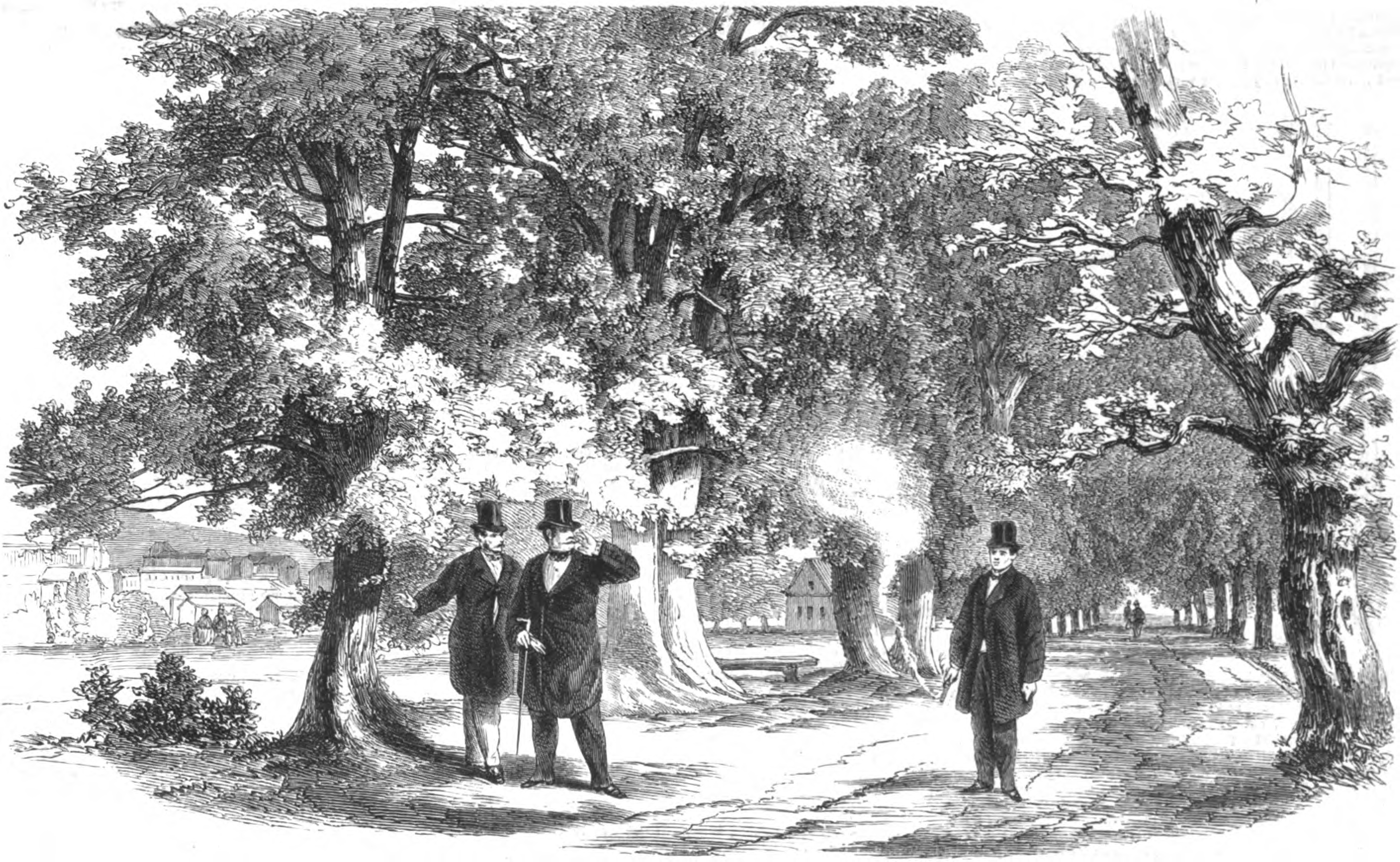 Illustration der Szene des Attentats von Oskar Becker auf den preußischen König in Baden-Baden am 14. Juli 1861.